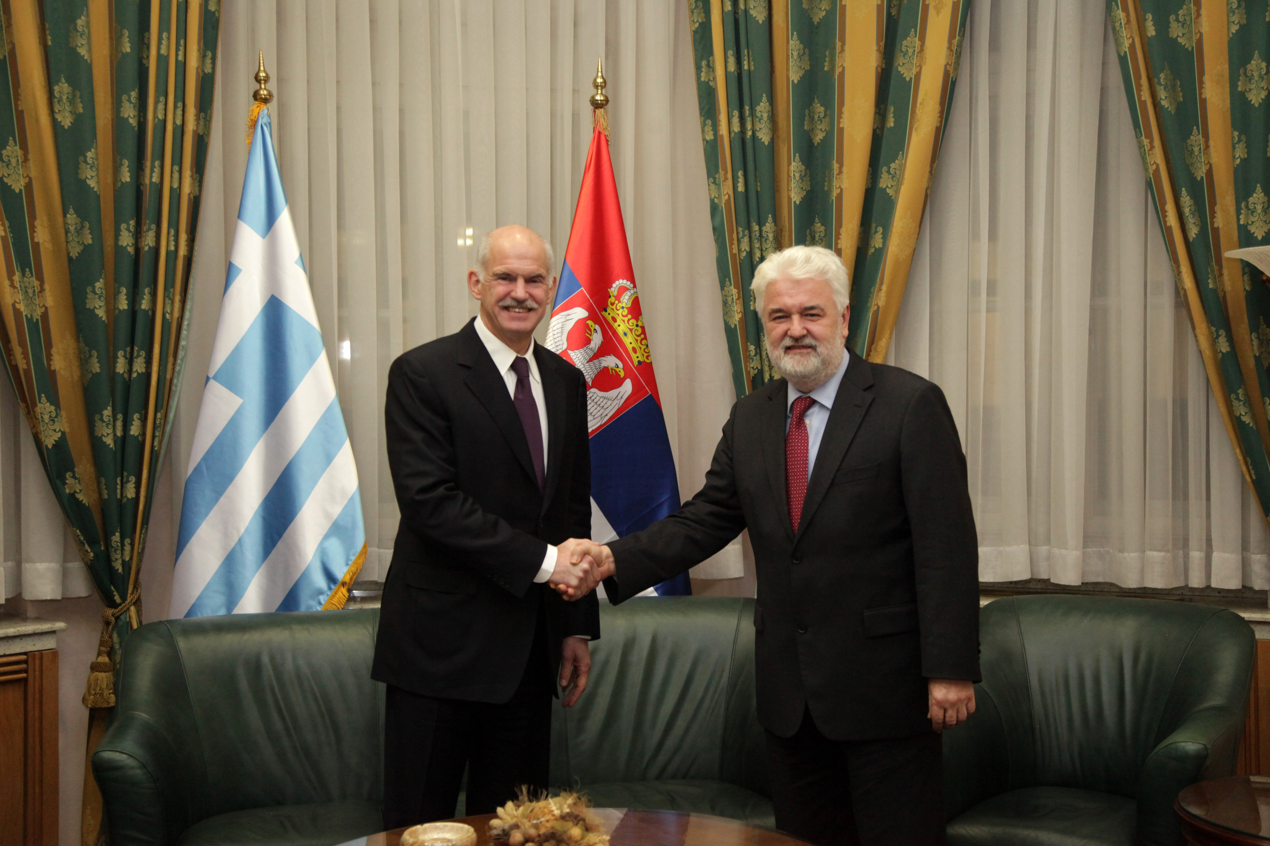 George Papandreou Jr. and Mirko Cvetković in Belgrade, 2010